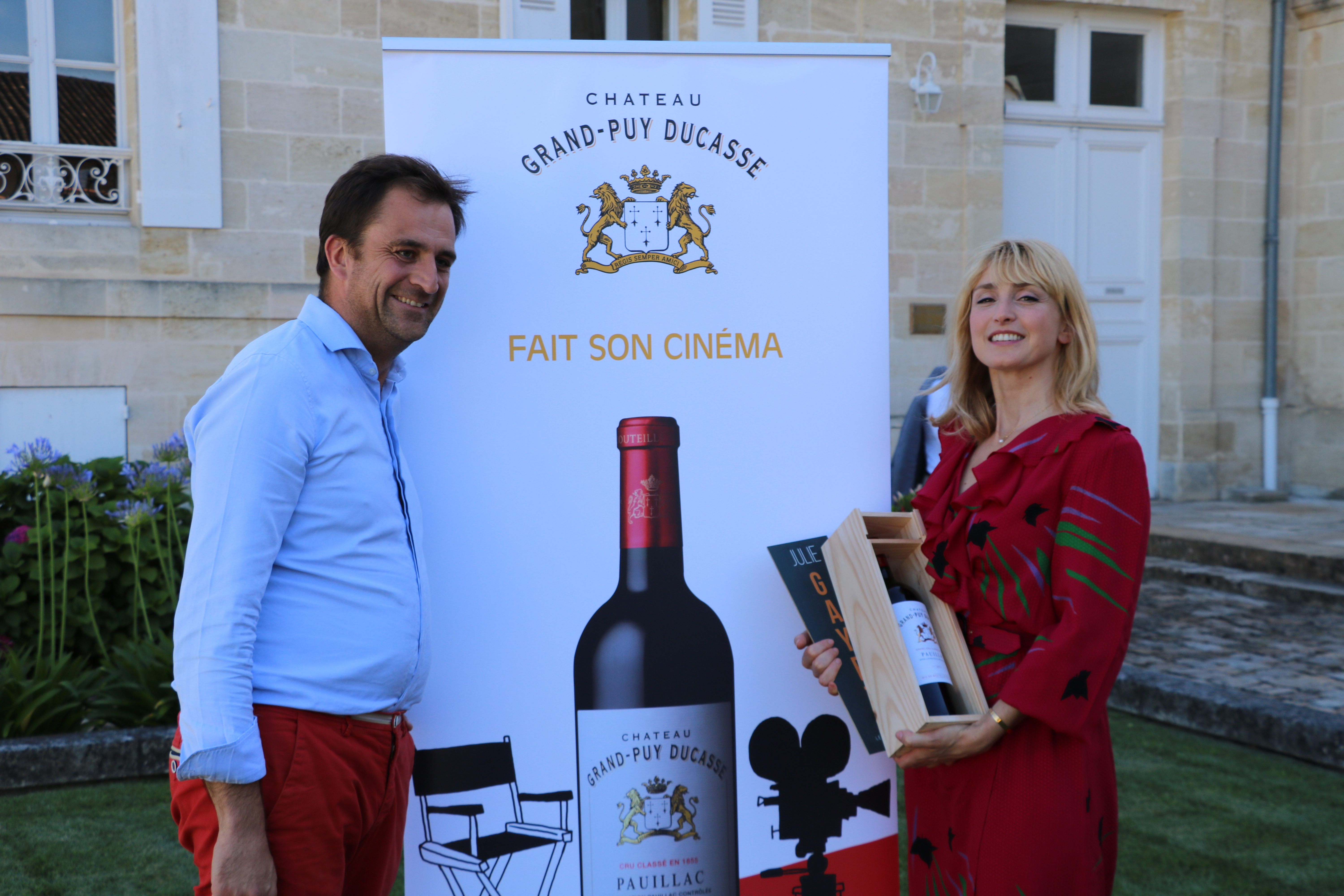 Rencontre avec Julie Gayet au Château Gran-Puy Ducasse lors du festival du film de Pauillac 2019